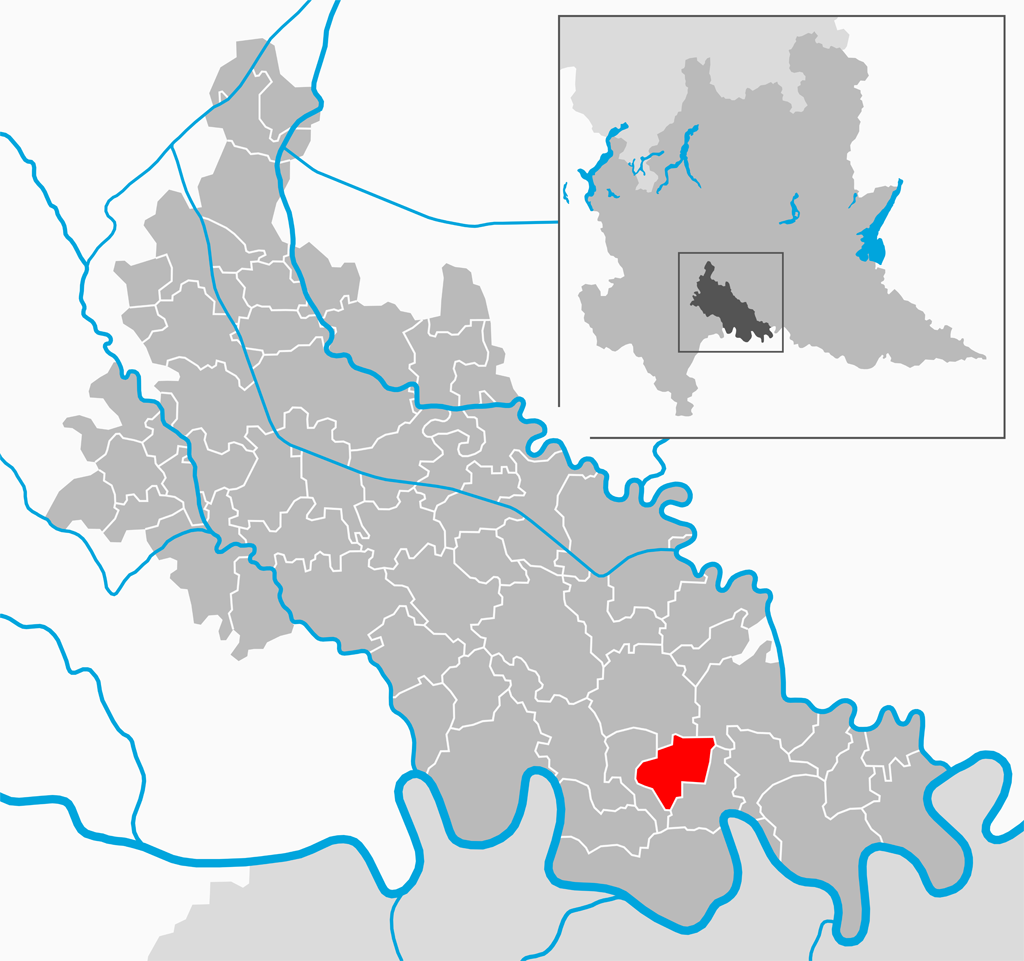 Il comune di San Fiorano nella provincia di Lodi